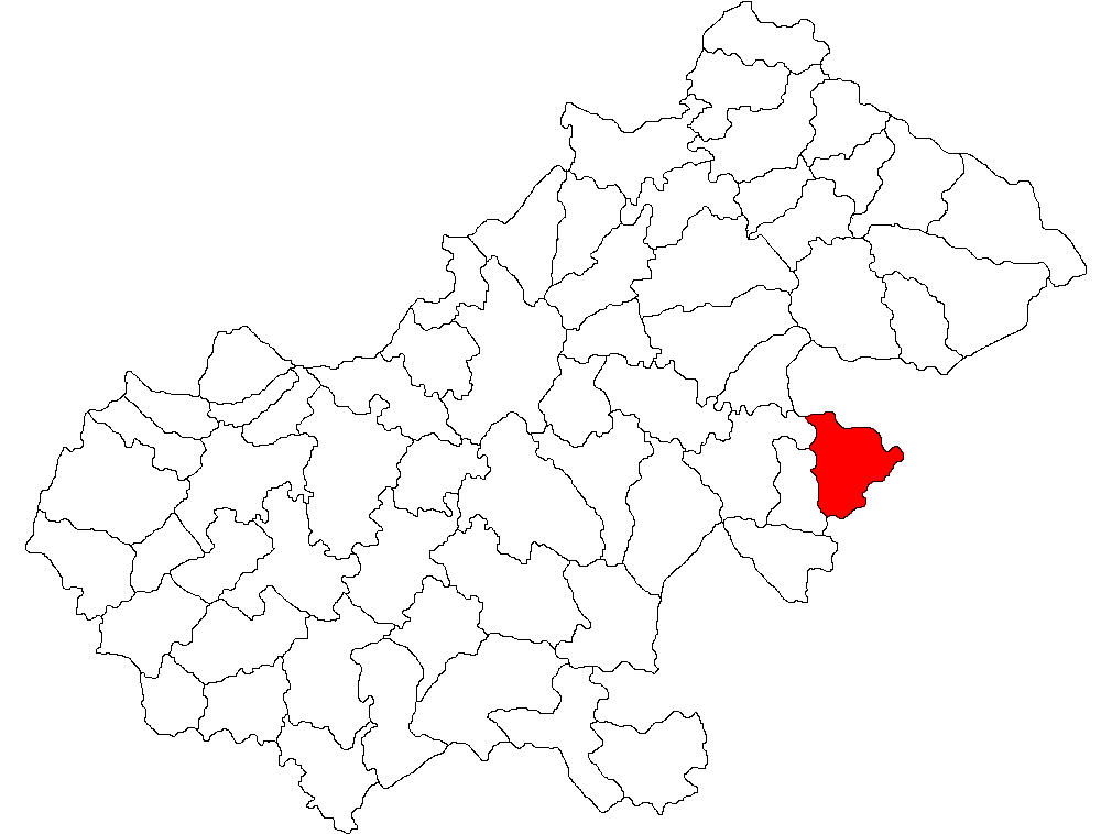 Categorie:Hărţi ale judeţului Satu Mare